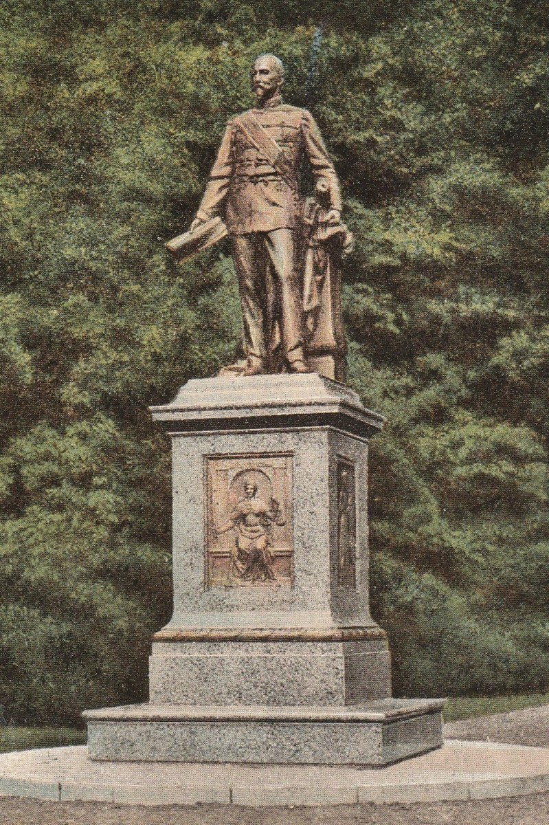 Denkmal im Englischen Garten in Meiningen für Herzog Bernhard Erich Freund von Sachsen-Meiningen (Bernhard II.)